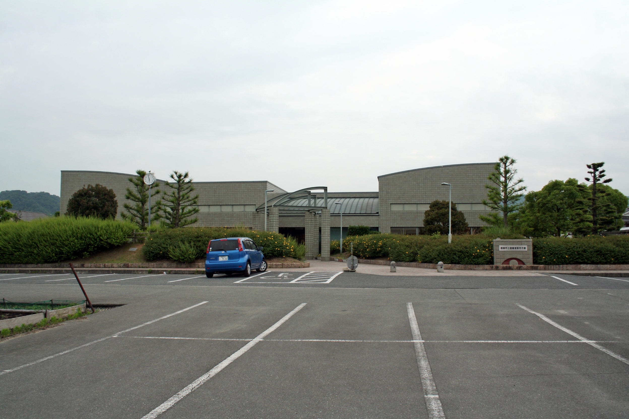 姫路市立図書館香寺分館。